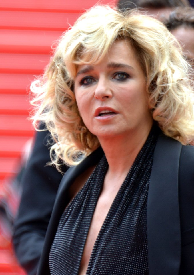 Valeria Golino au Festival de Cannes 2019.